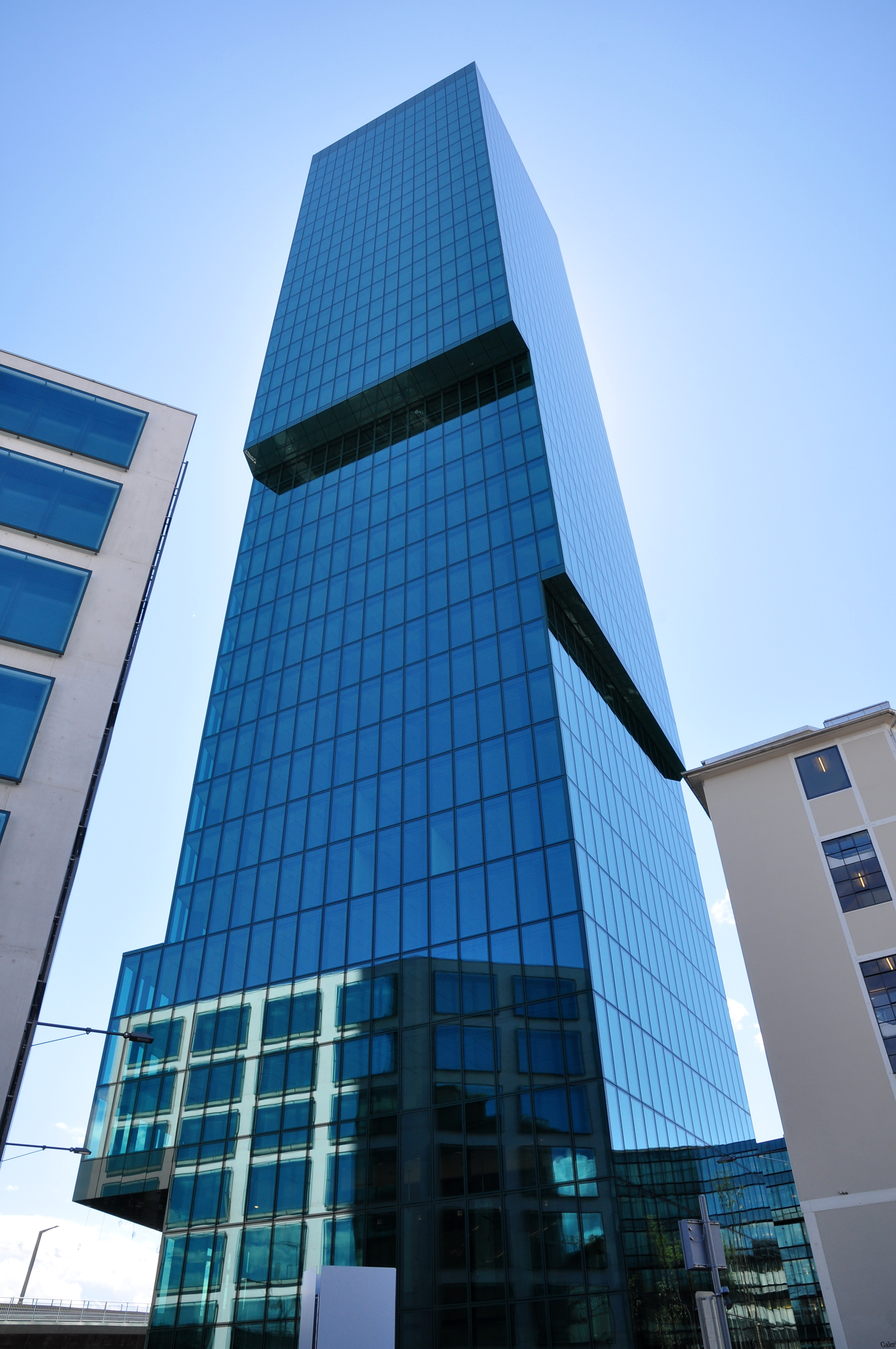 Prime Tower in Zürich-West (Switzerland)